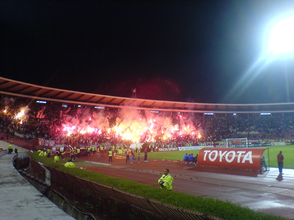 Aficionados del Estrellla Roja de Belgrado